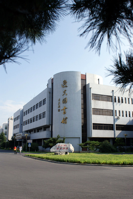 中文（中国大陆）: 吉林大学南区逸夫图书馆(老图书馆)。